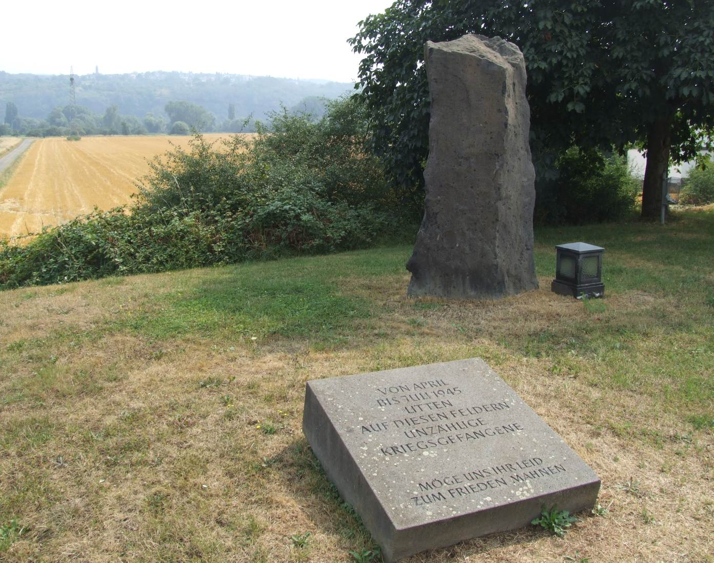 Goldene Meile, Gedenkstein Kregsgefangenenlager